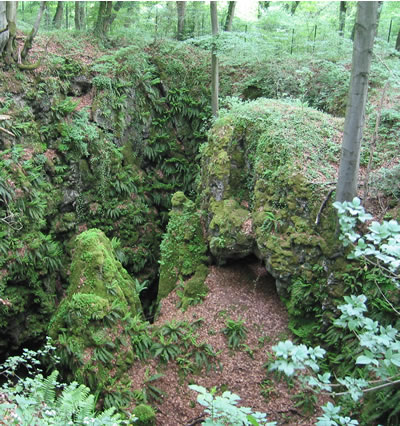 Große Pinge bzw. Tagesöffnung der ehemaligen Eisenerzgrube „Rom“ im Naturschutzgebiet „Oberhagen“, Warstein